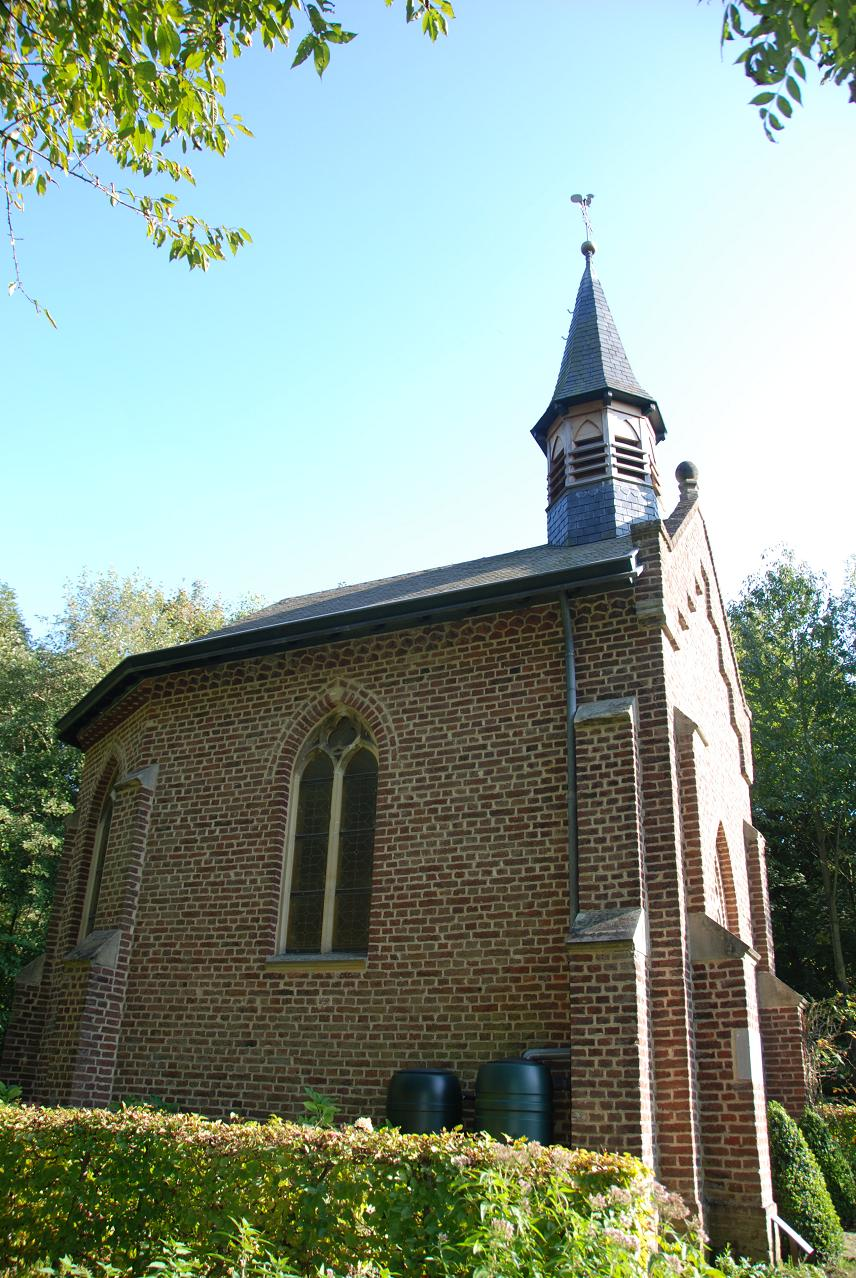 Limburgs: De Aw Kèrk bie Sjpawbik